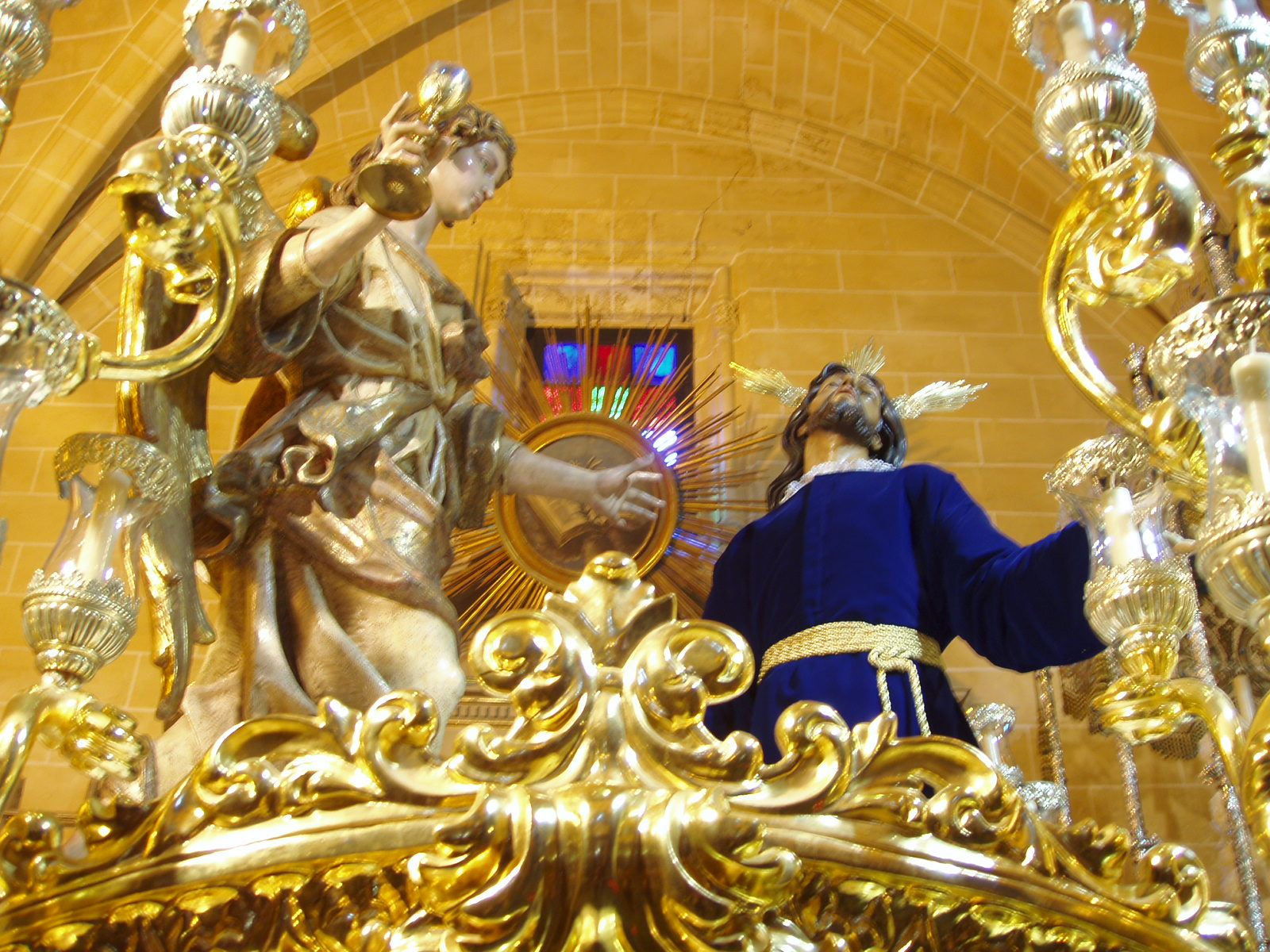 El Olivo en la Iglesia Mayor Prioral. Semana Santa en El Puerto de Santa María, Cádiz, España.